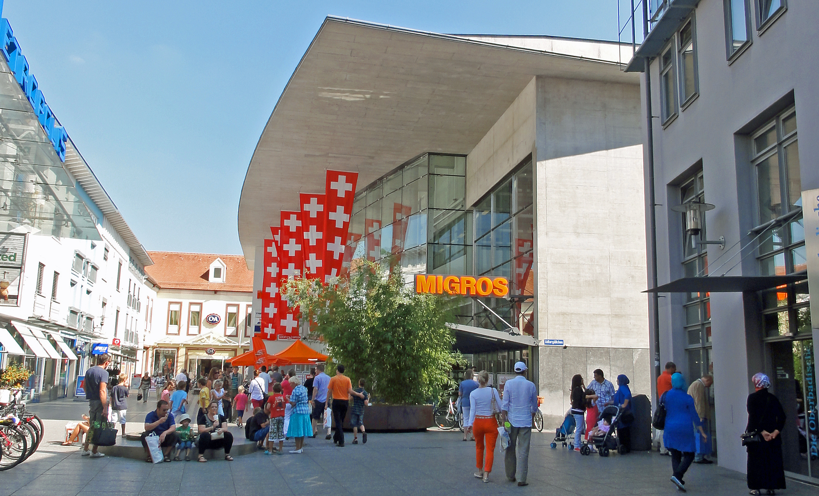 Lörrach — Am Alten Markt 4 (Migros).